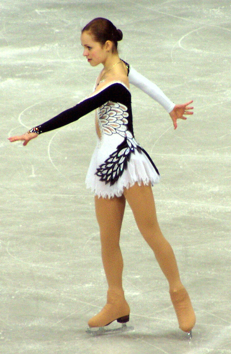 hier bei der Qulifikationskür bei der Weltmeisterschaft im Eiskunstlaufen 2004 in Dortmund